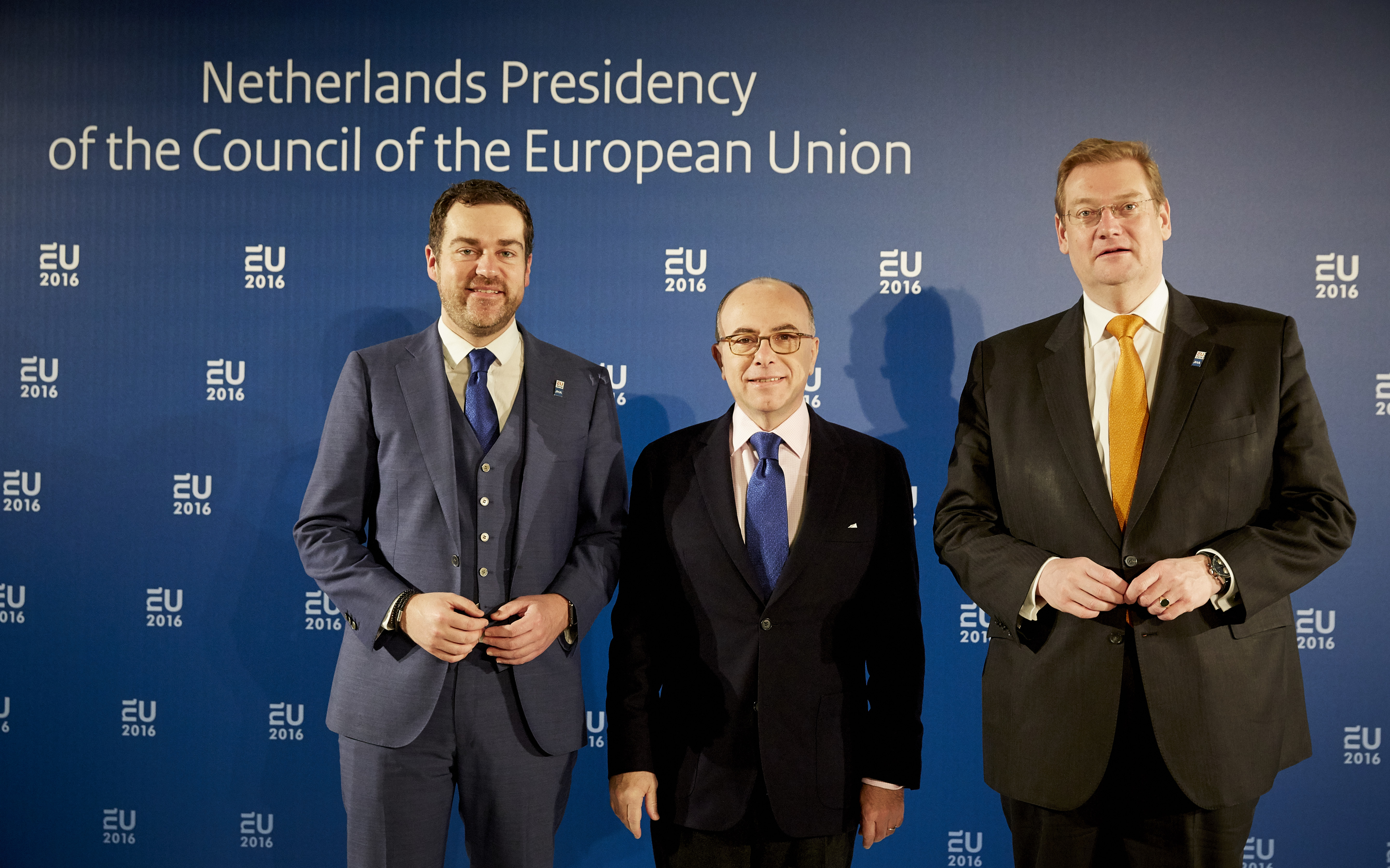 Amsterdam, 25 januari 2016 / Amsterdam, January 25th 2016. Minister Ard van der Steur en staatssecretaris Klaas Dijkhoff De ministers van Veiligheid en Justitie van de Europese Commissie bij het Scheepvaartmuseum in Amsterdam. The ministers of Justices of the European Commission at the Scheepvaartmuseum in Amsterdam by boat. Foto: Rijksoverheid/Martijn Beekman – Photograph: Dutch Government/Martijn Beekman